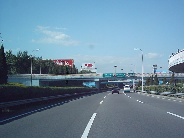 机场高速公路，CNDF08在2004年拍照的图片